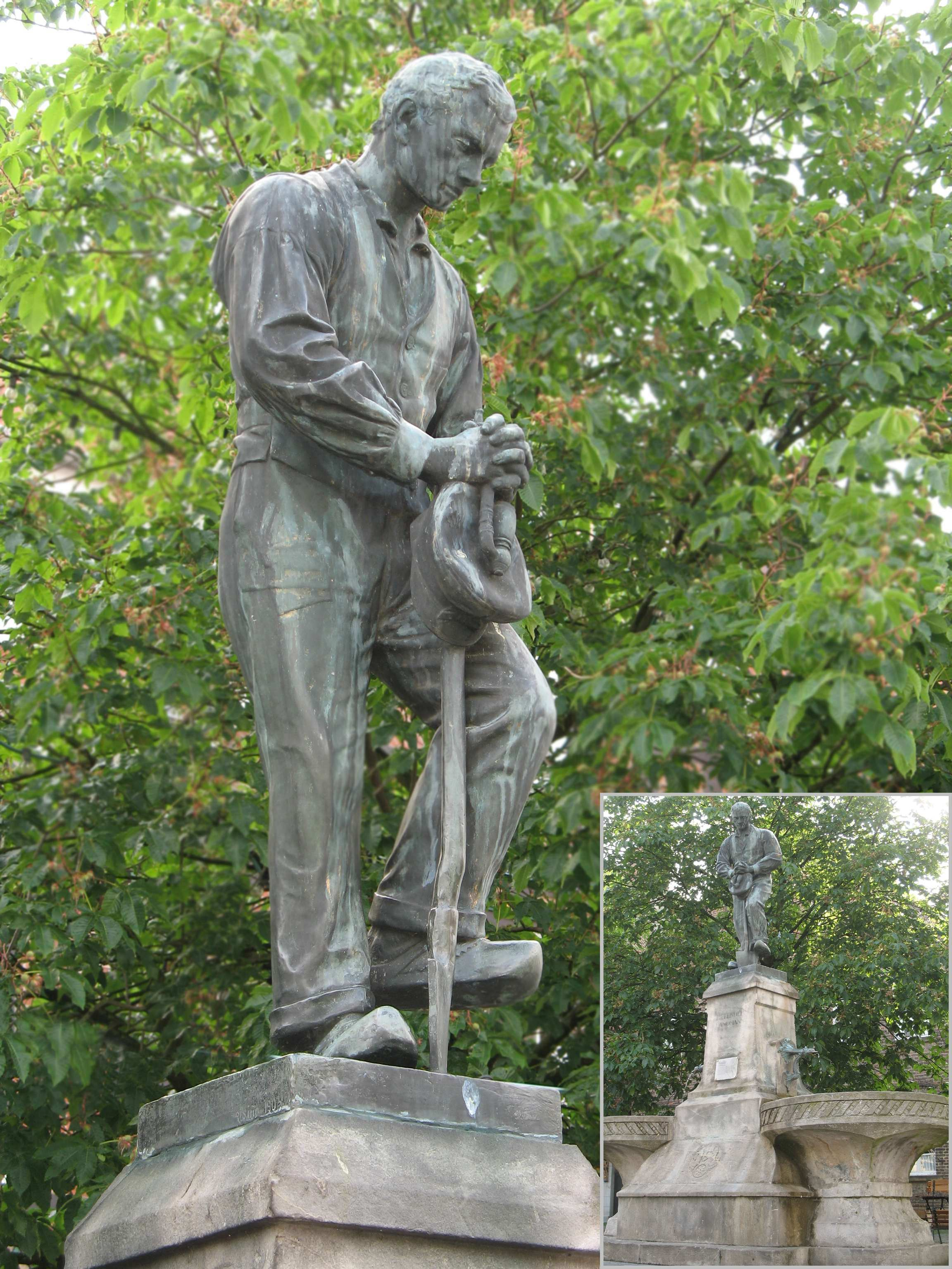 Wiedenbrück: Denkmal „Betender Landmann“ von Bernhard Heising in Rheda-Wiedenbrück